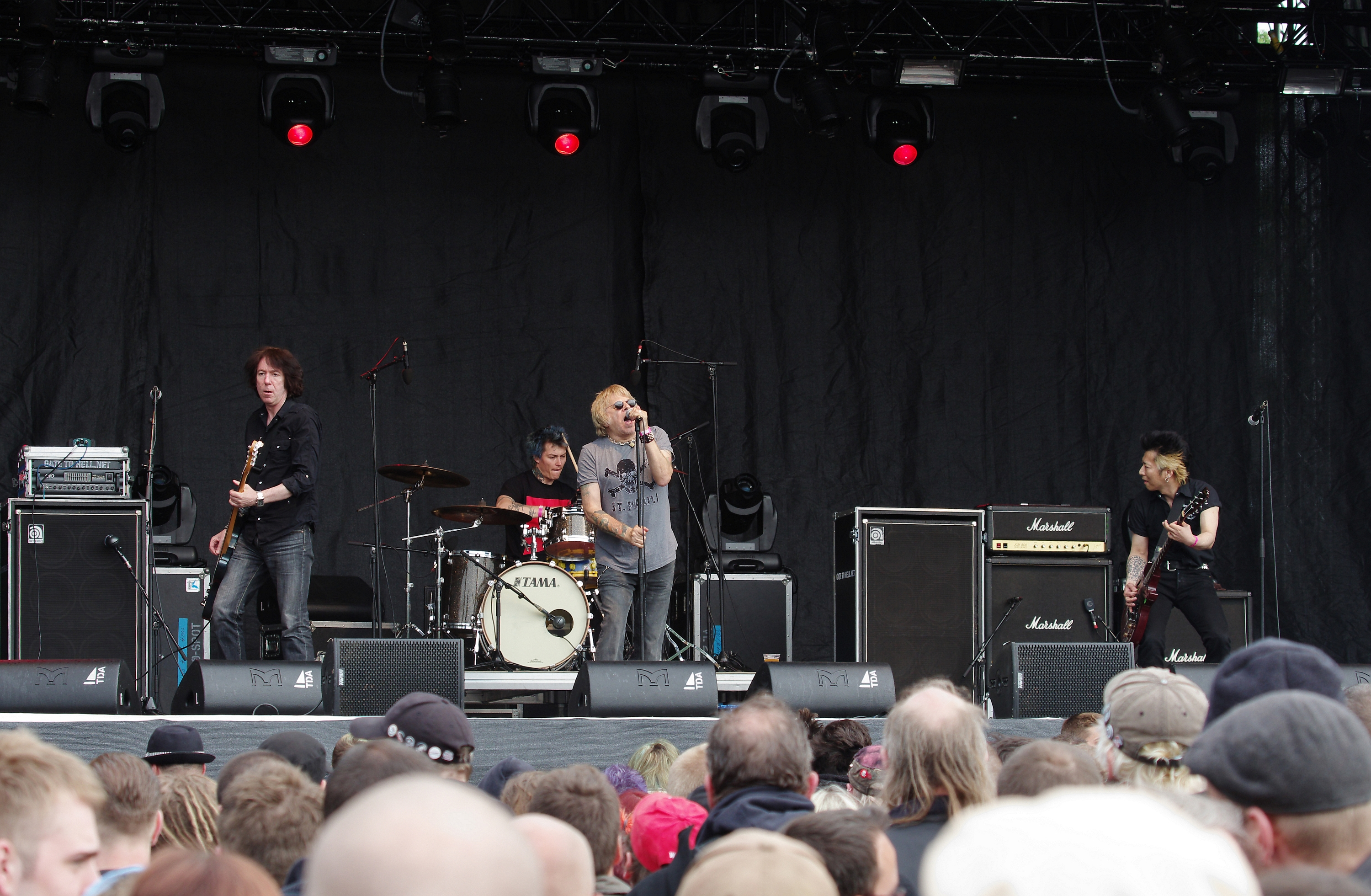 UK Subs beim Ruhrpott Rodeo 2013 in Hünxe.